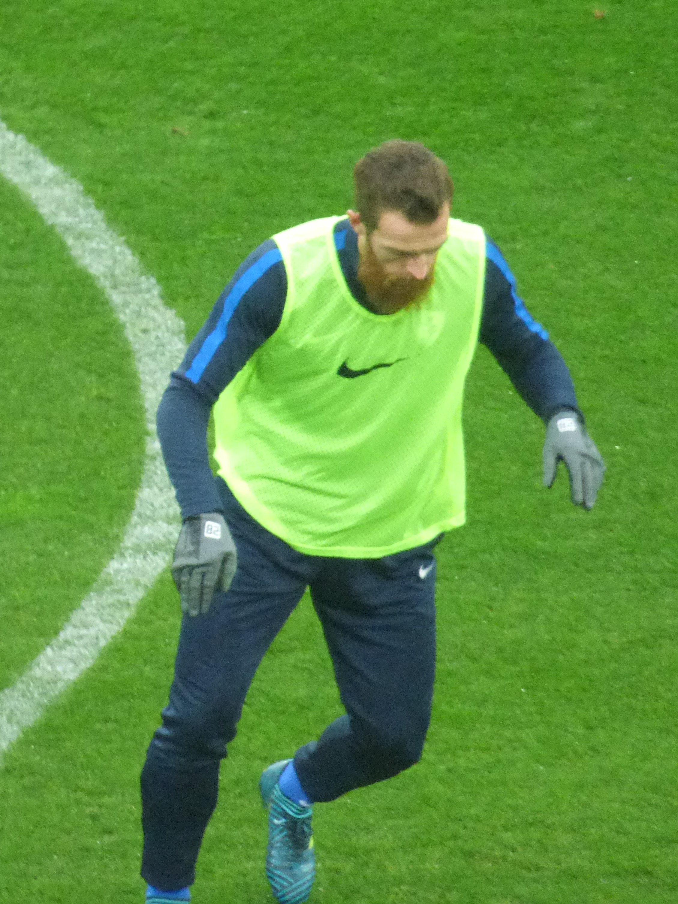 Julien Delétraz avant le match RC Lens / Grenoble Foot 38, le 24 novembre 2018, comptant pour la quinzième journée du championnat de France de football de Ligue 2 2018-2019, au Stade Bollaert-Delelis.